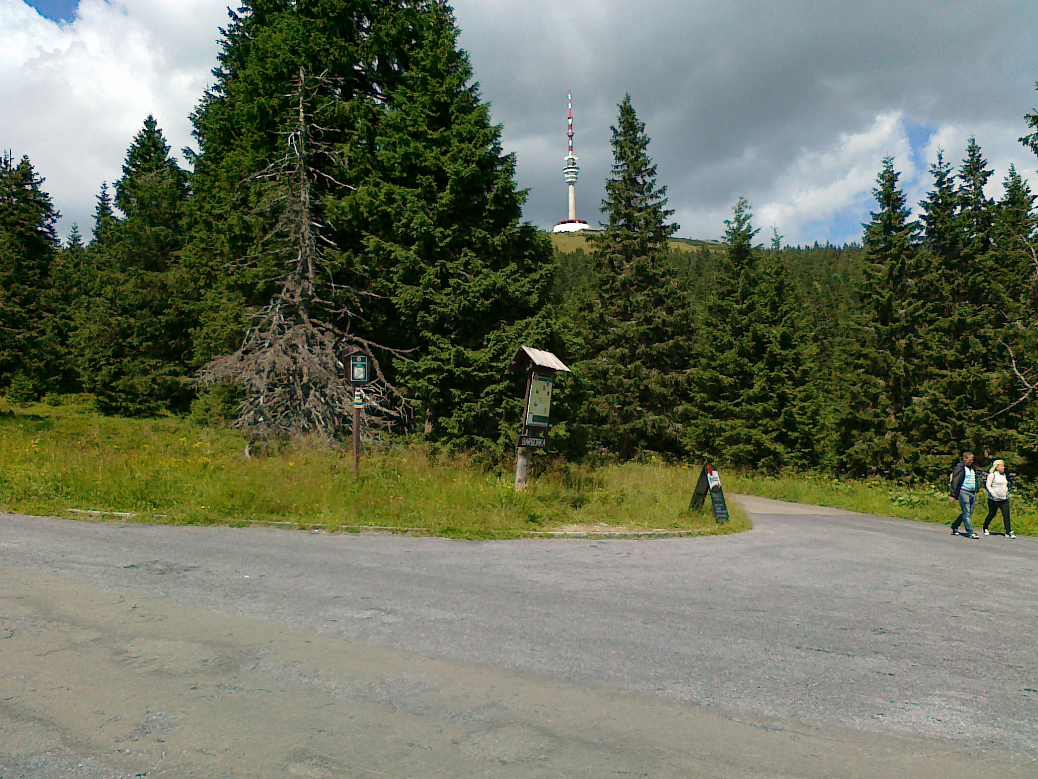 Widok ze skrzyżowania U Barborky na szczyt góry Praděd - 1491 m